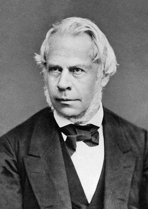 Jakob Henle